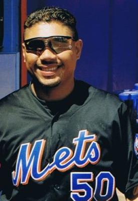 Benny Agbayani at Beanie Babies Day at Shea